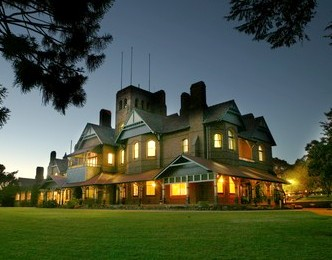 Booloominbah, NSW, Australia